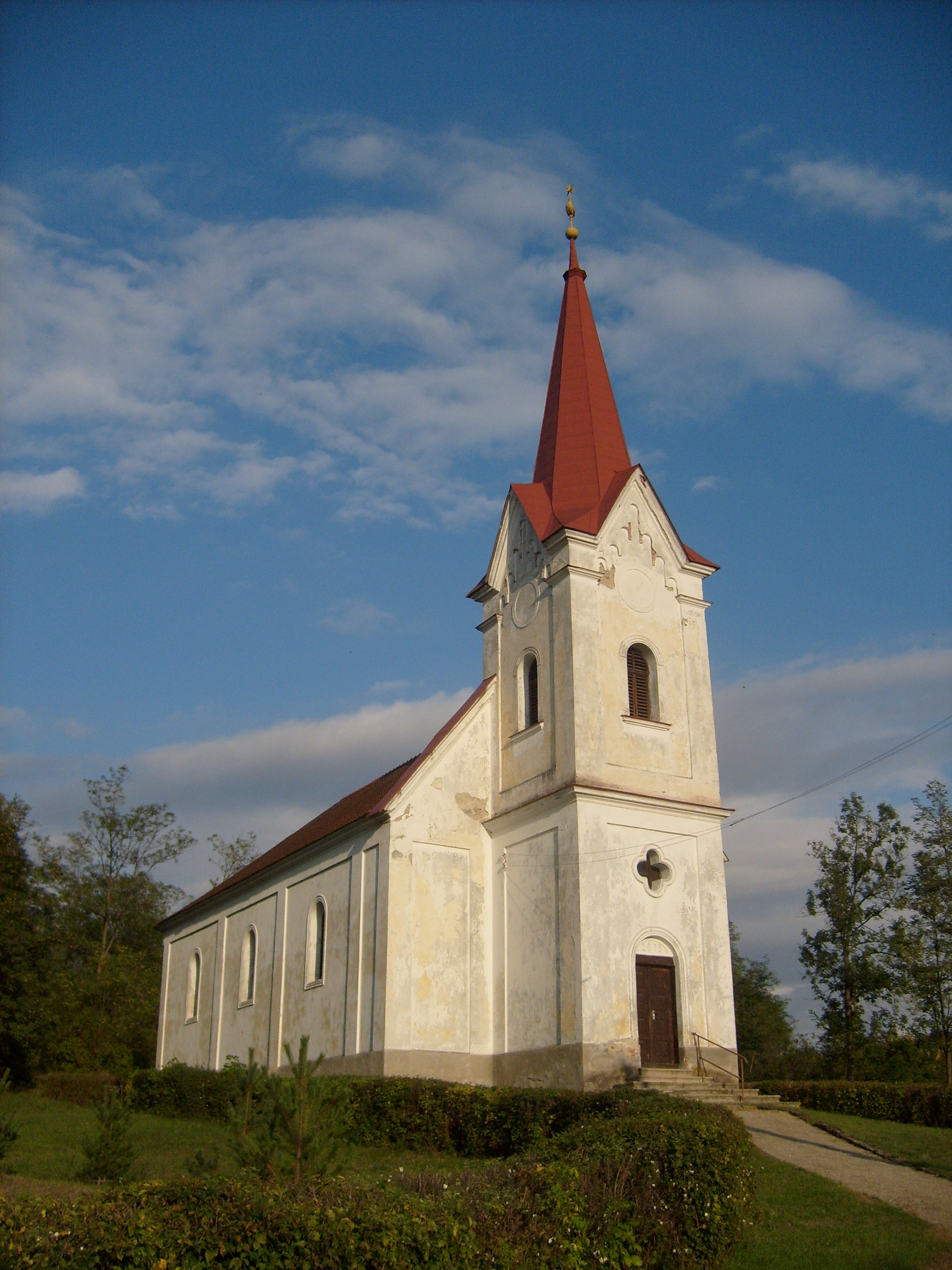 Csíz község református temploma